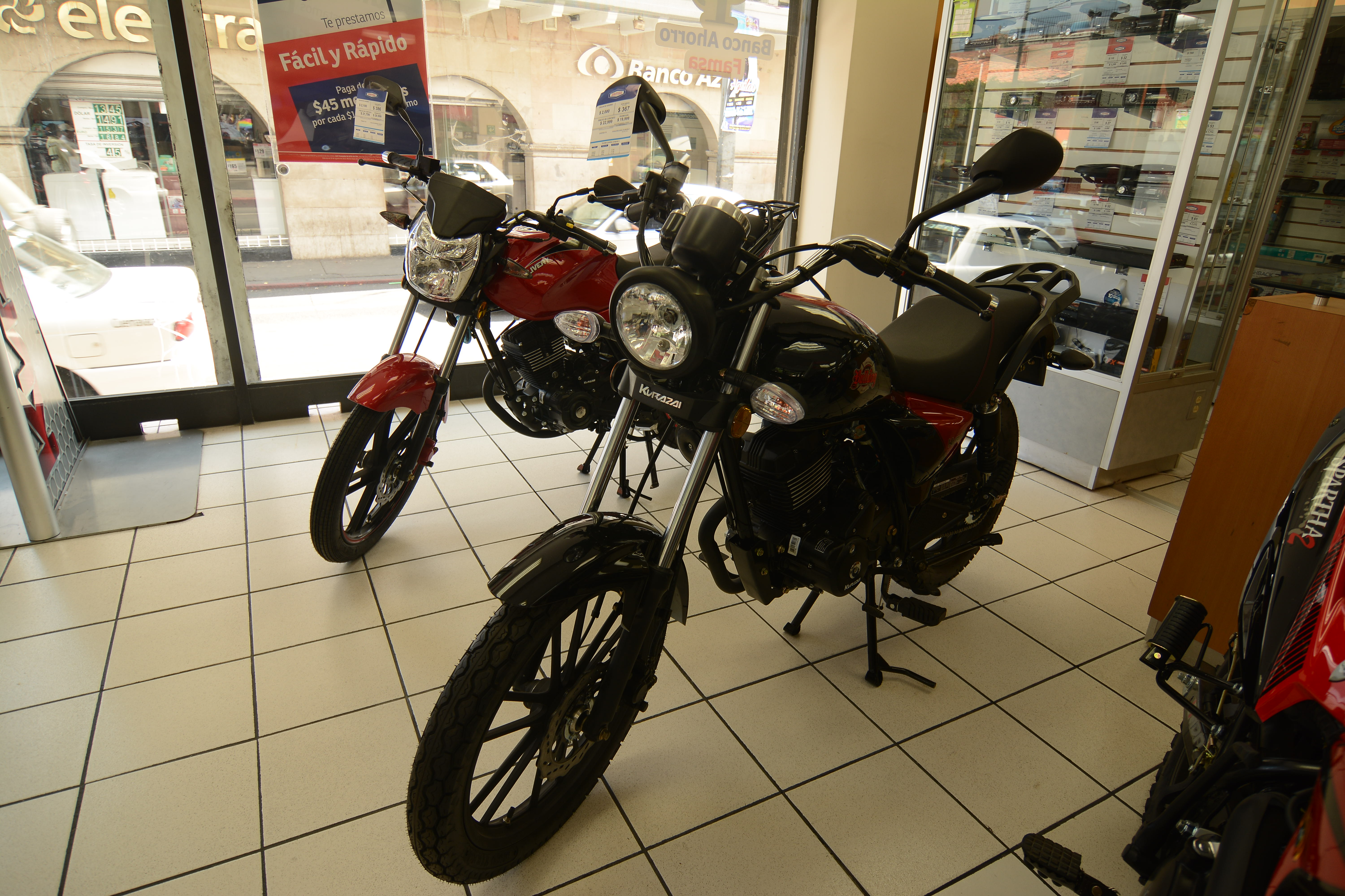 Motocicleta tipo Custom